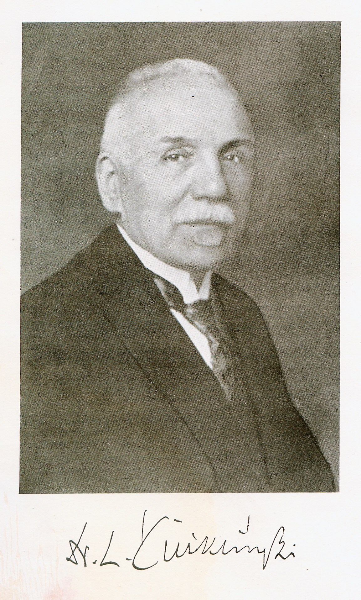 Zdjęcie portretowe Ludwika Ćwiklińskiego